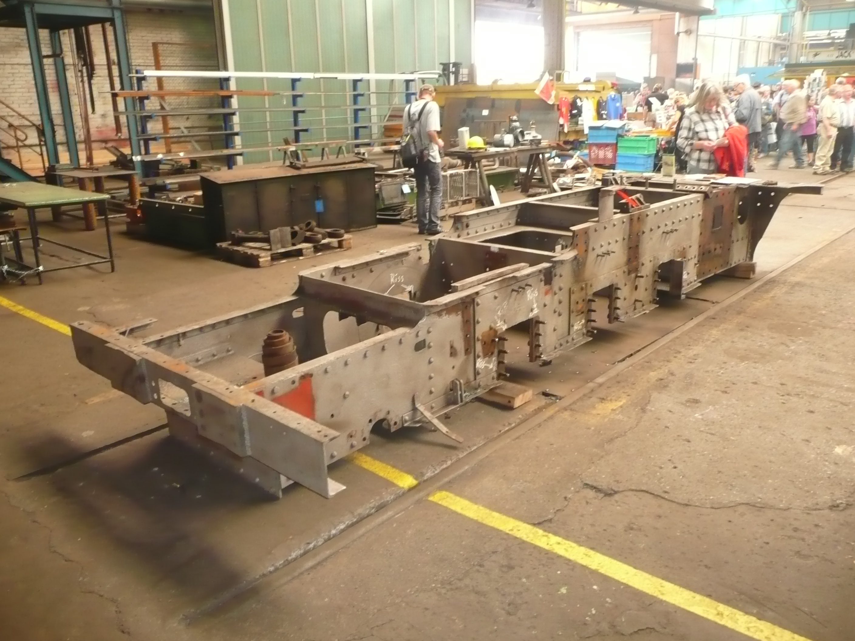 originaler Blechrahmen der Heeresfeldbahnlokomotive HF 110 C